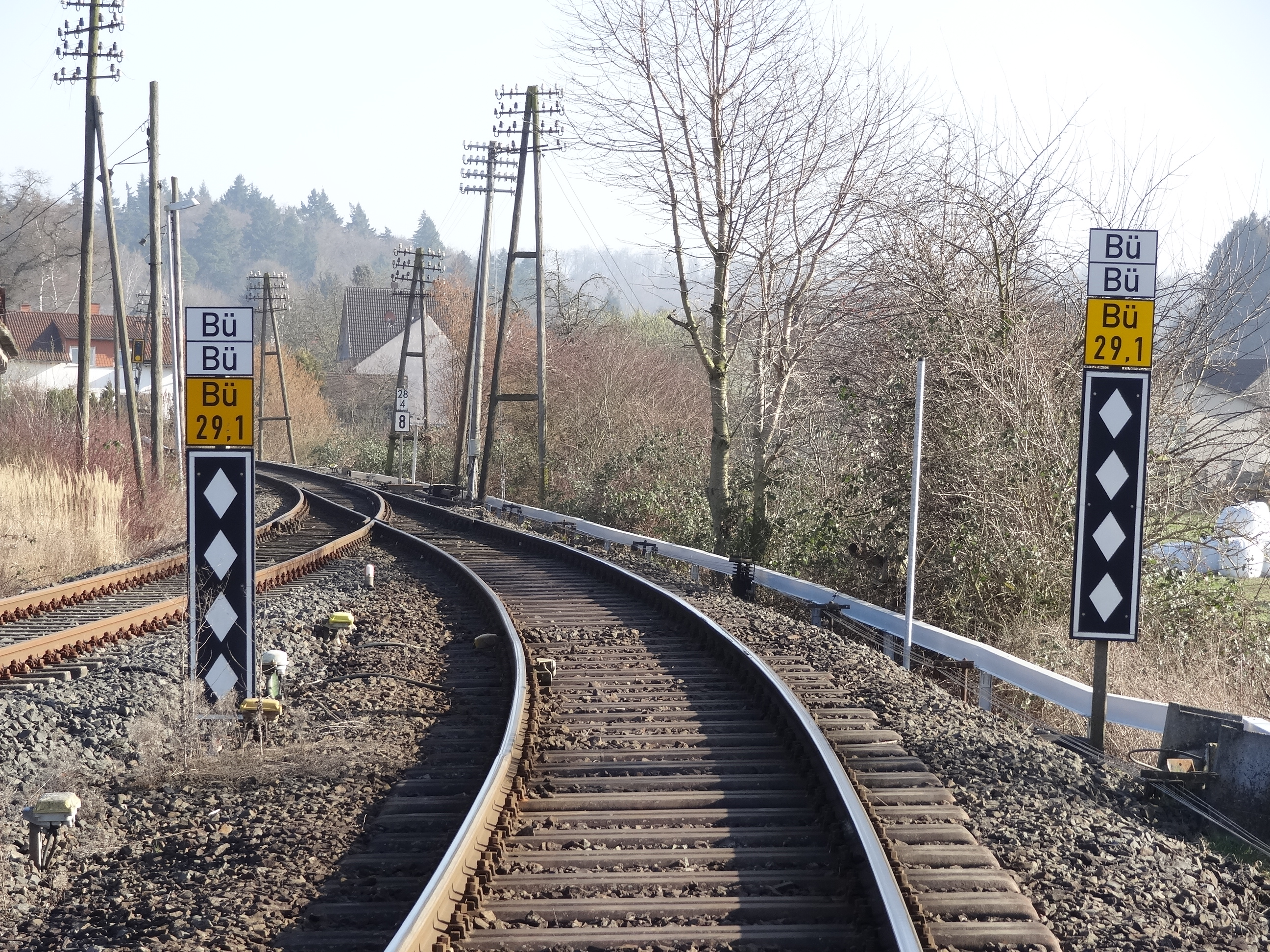 Bahnstrecke Gießen–Gelnhausen